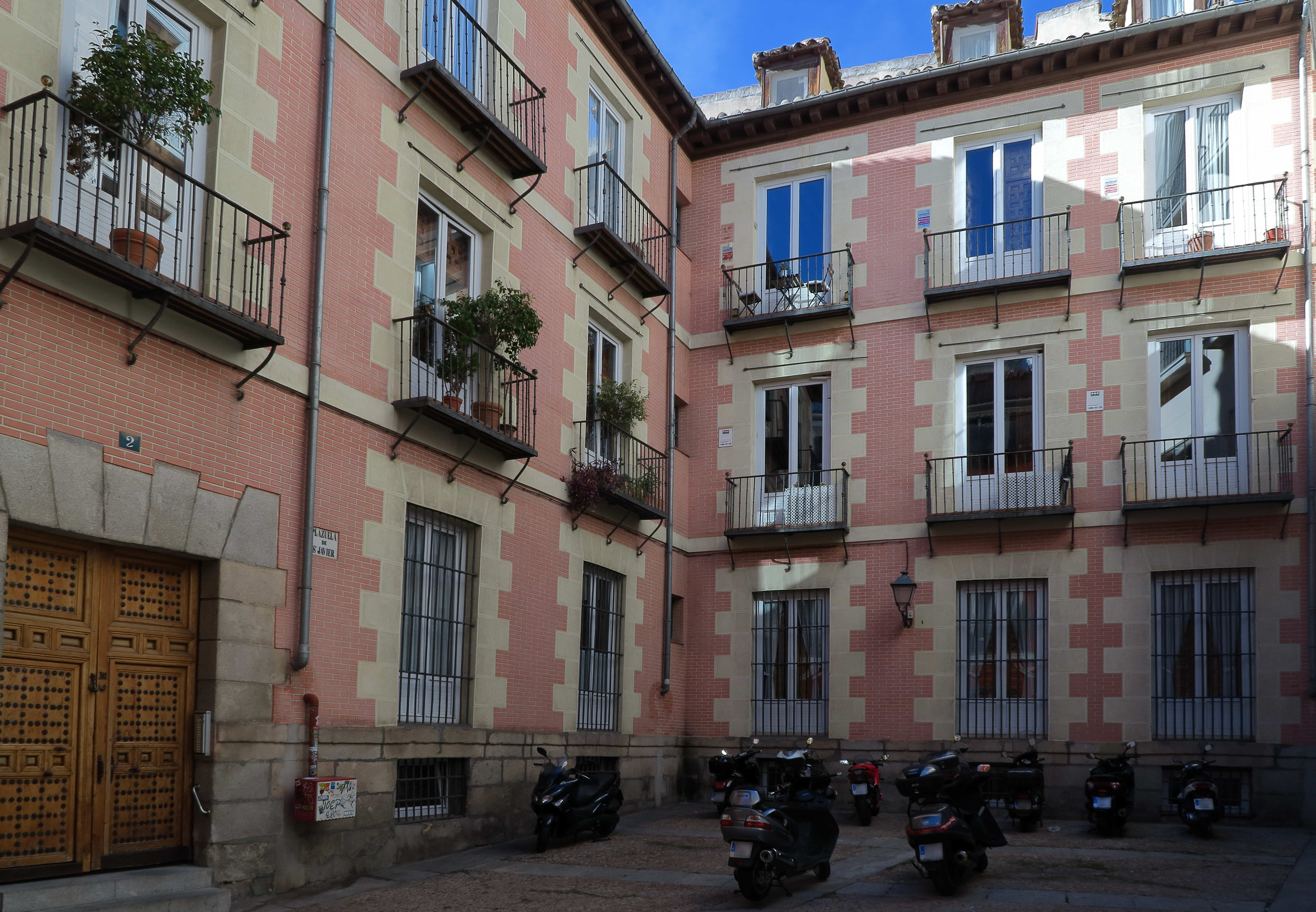 Plazuela de San Javier, 01